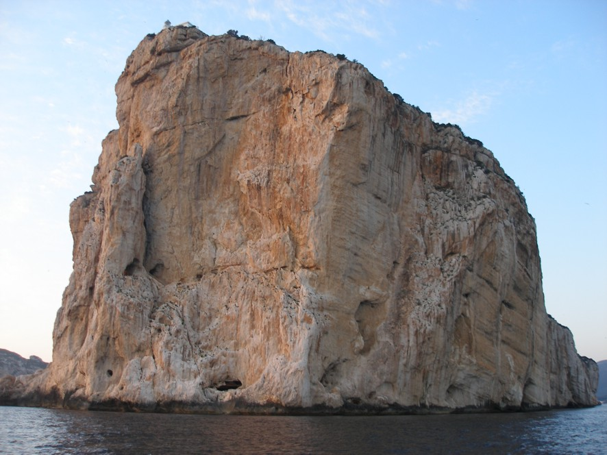 Frontone di Capo Caccia. Il capo delimita con Punta Gilgio il golfo di Porto Conte